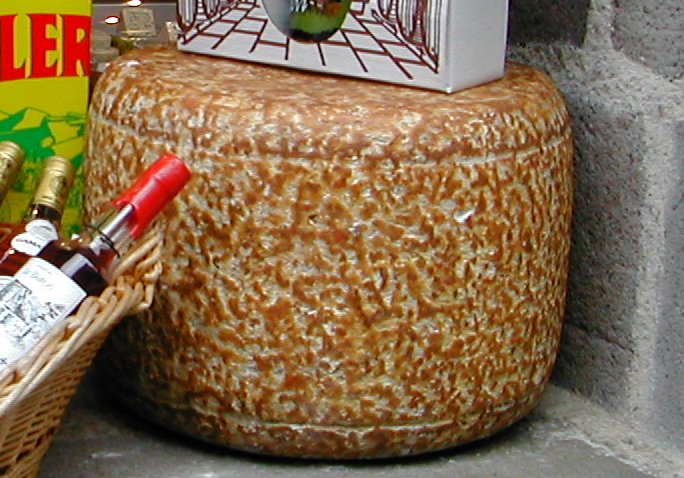 Photographie d'une meule de Salers (Fromage de Salers, Cantal, France). Prise le 16 avril 2004. Domaine public.